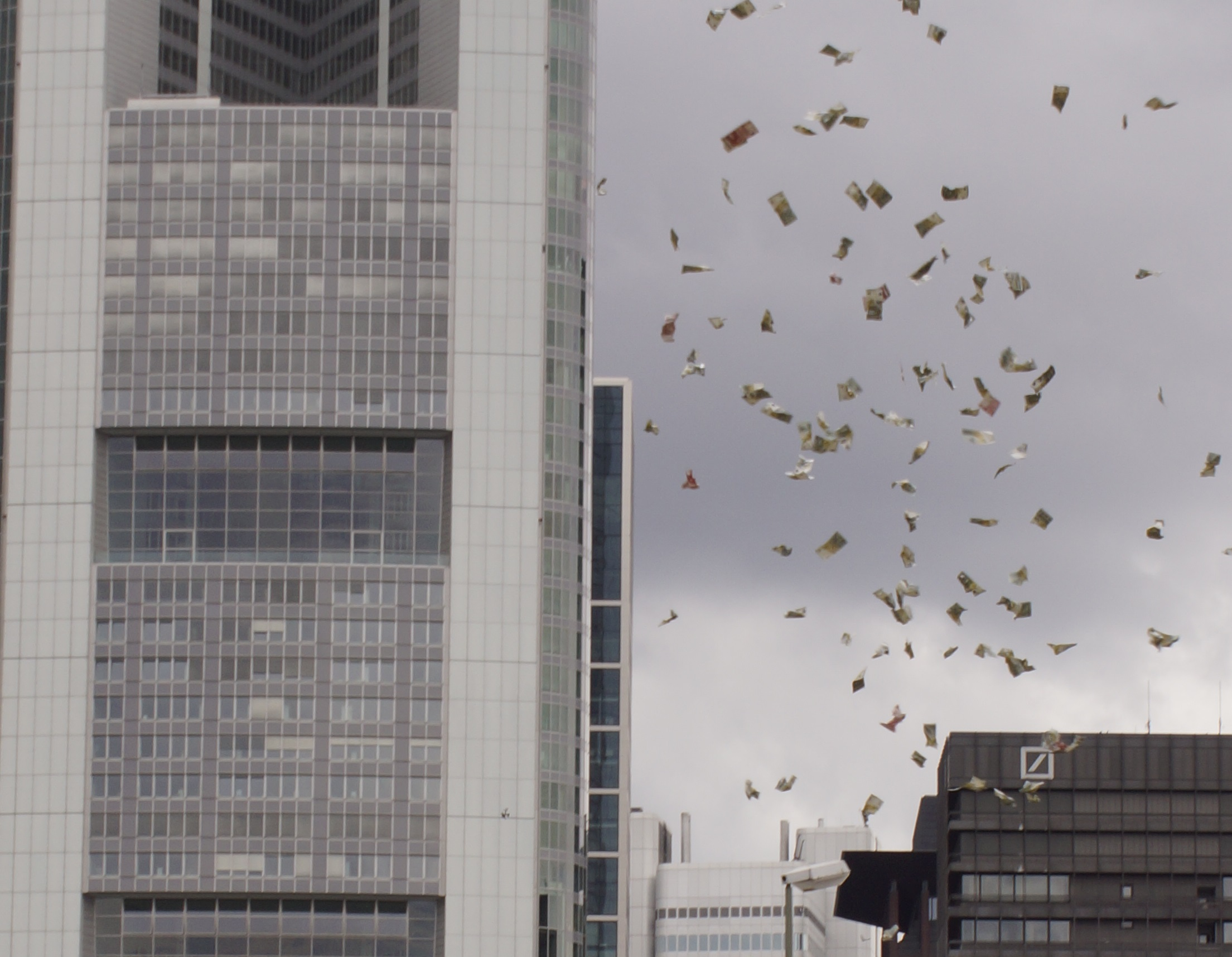 PEACE-Aktion in Frankfurt (Main)